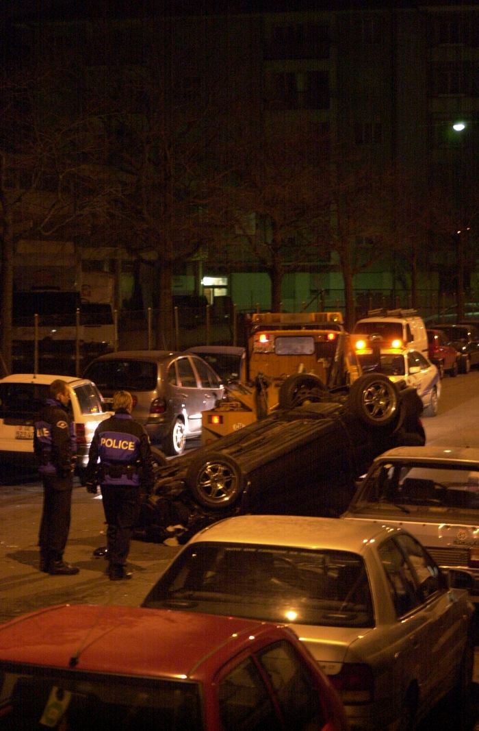 Police genevoise sur un accident